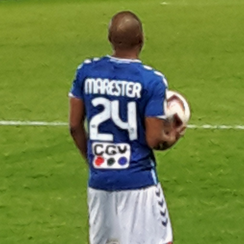 Marester effectuant une touche lors du match entre le RCSA et Belfort.